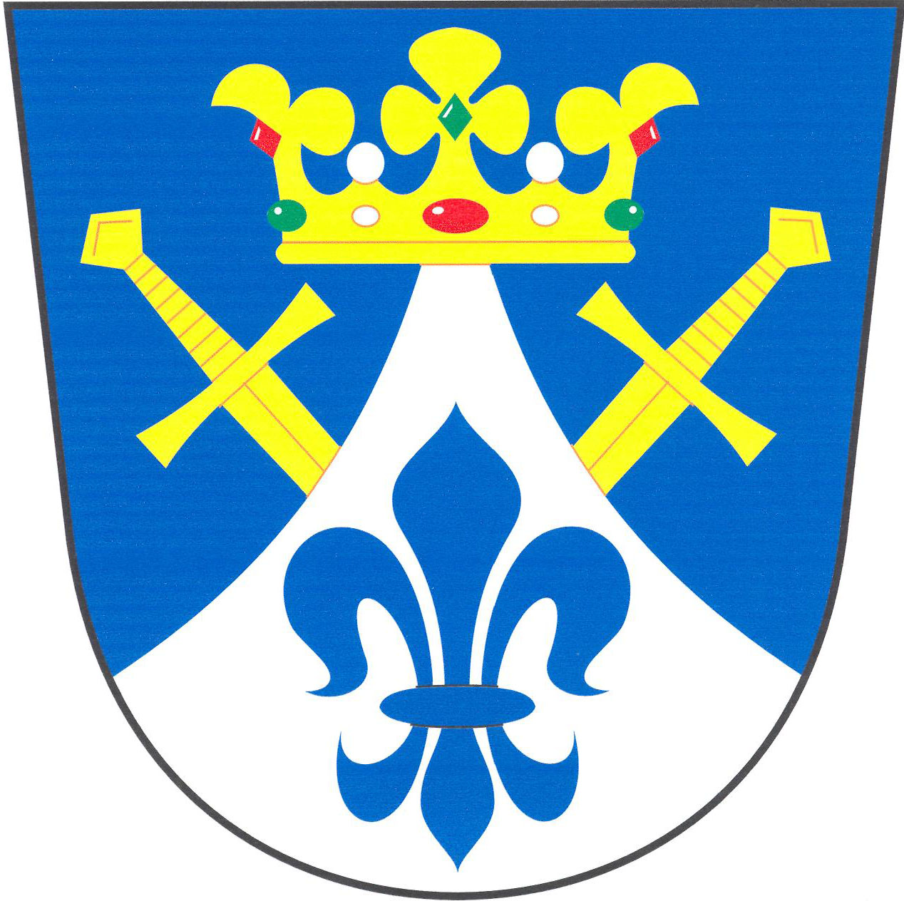 Znak obce Stanoviště